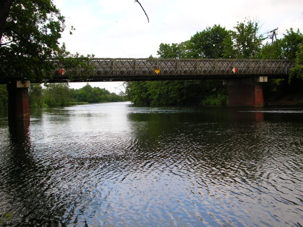 Most w ul. Spornej w Bydgoszczy. Na zdjęciu konstrukcja tymczasowa istn. w latach 1994-2009